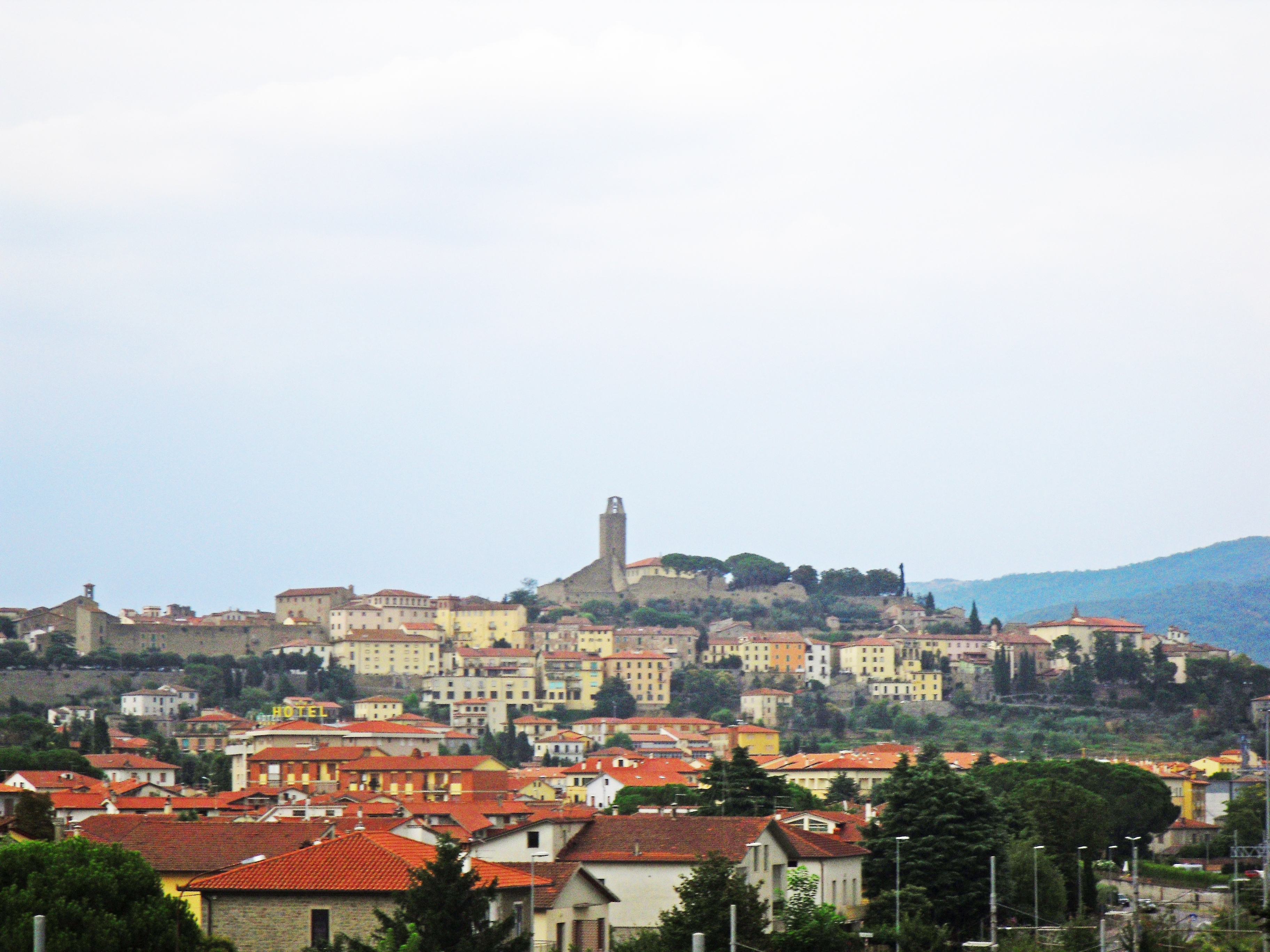 Panorama di Castiglion Fiorentino (Provincia di Arezzo, Italia).